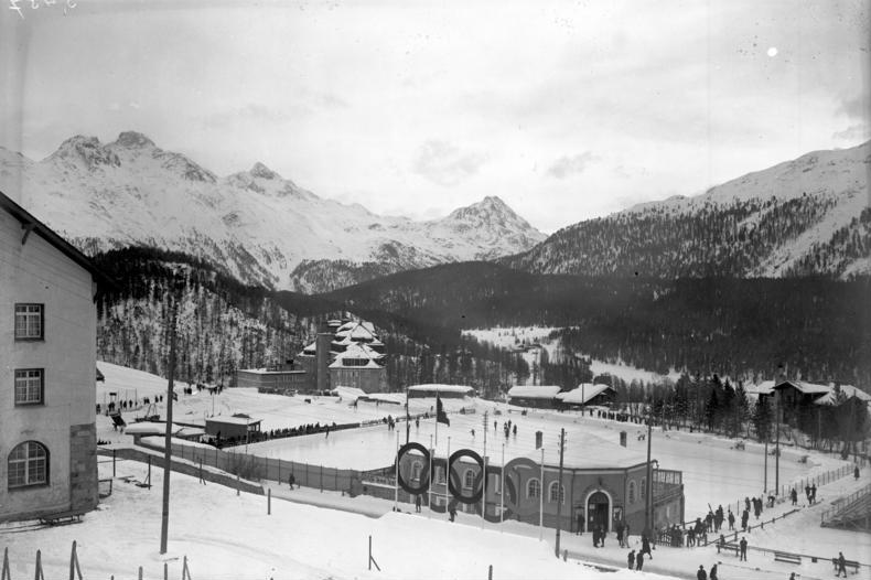 Blick auf das Eis-Stadion der Kulmplätze während der Entscheidung im Eis-Kunstlaufen. Im Hintergrund das Engadin-Gebirge.